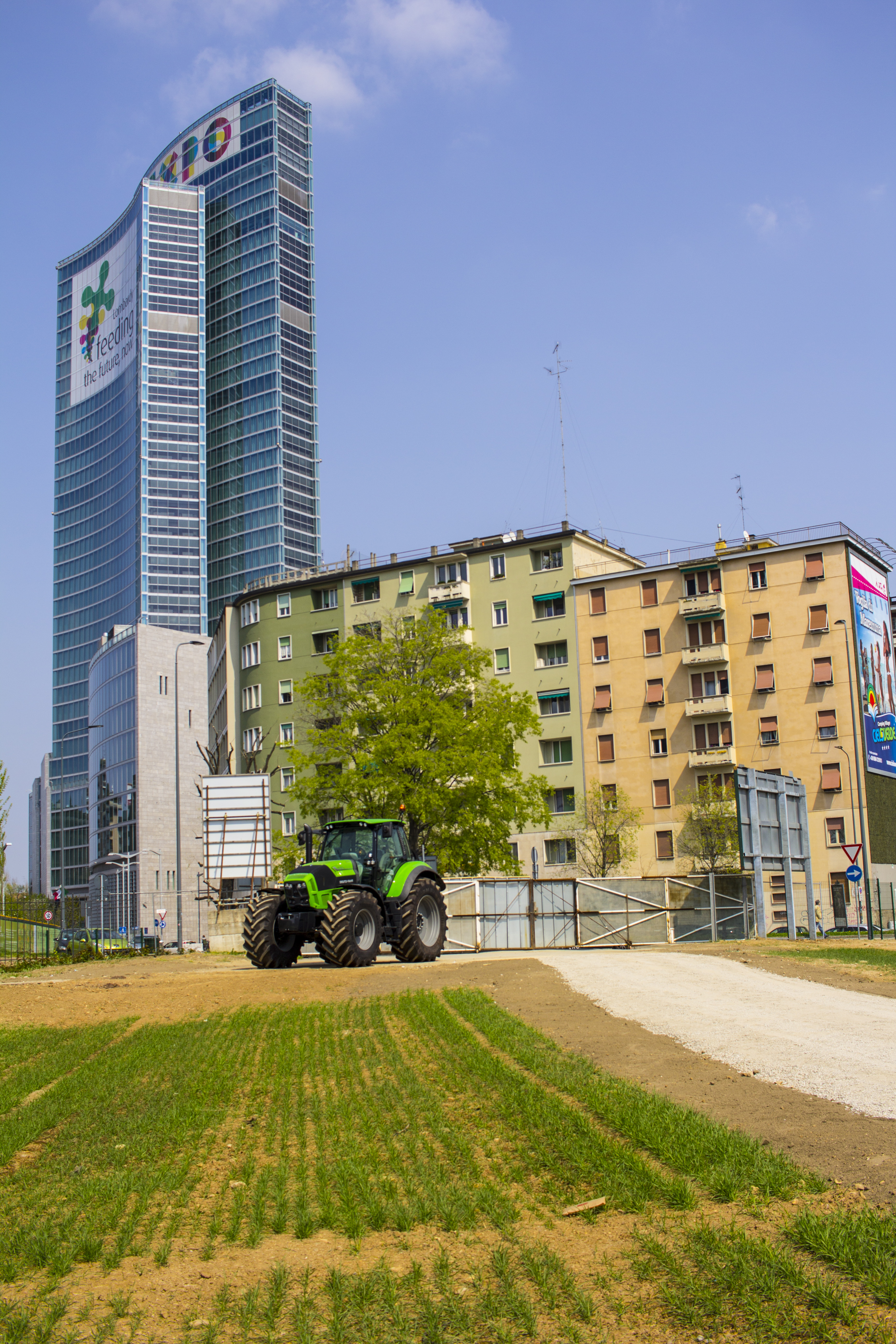 Palazzo Lombardia.